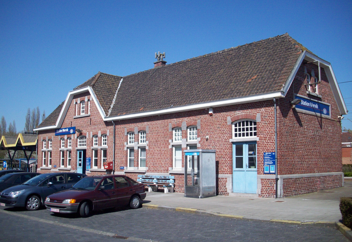 Station Wervik